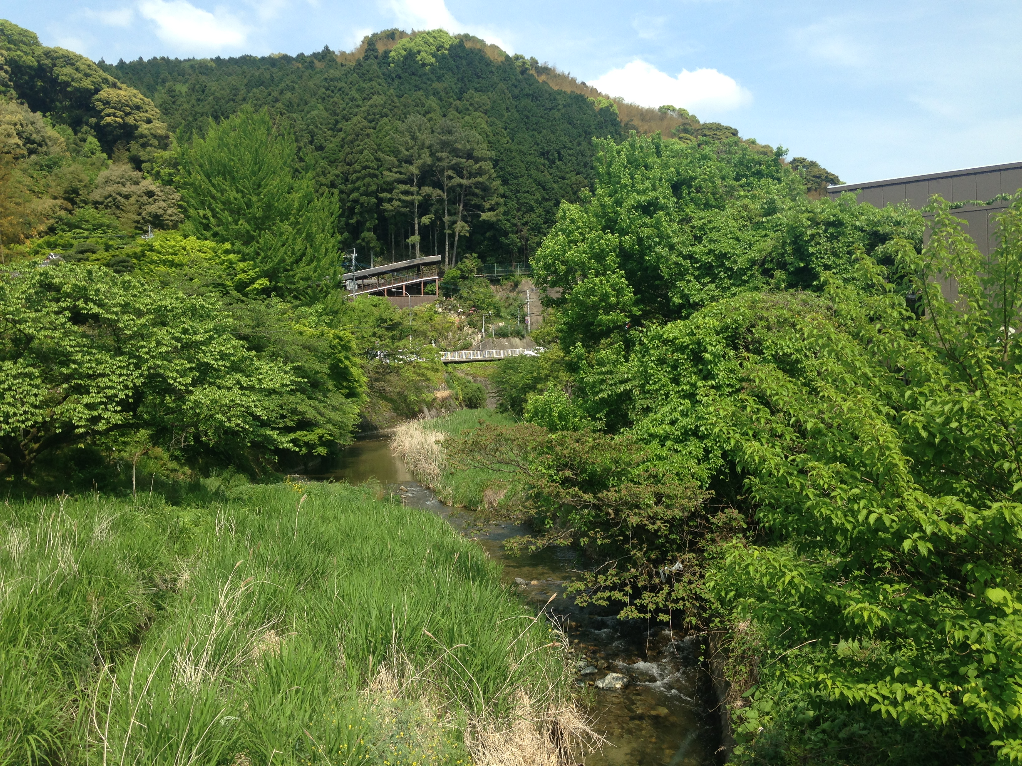 城戸音橋より望む多々良川(上流側)